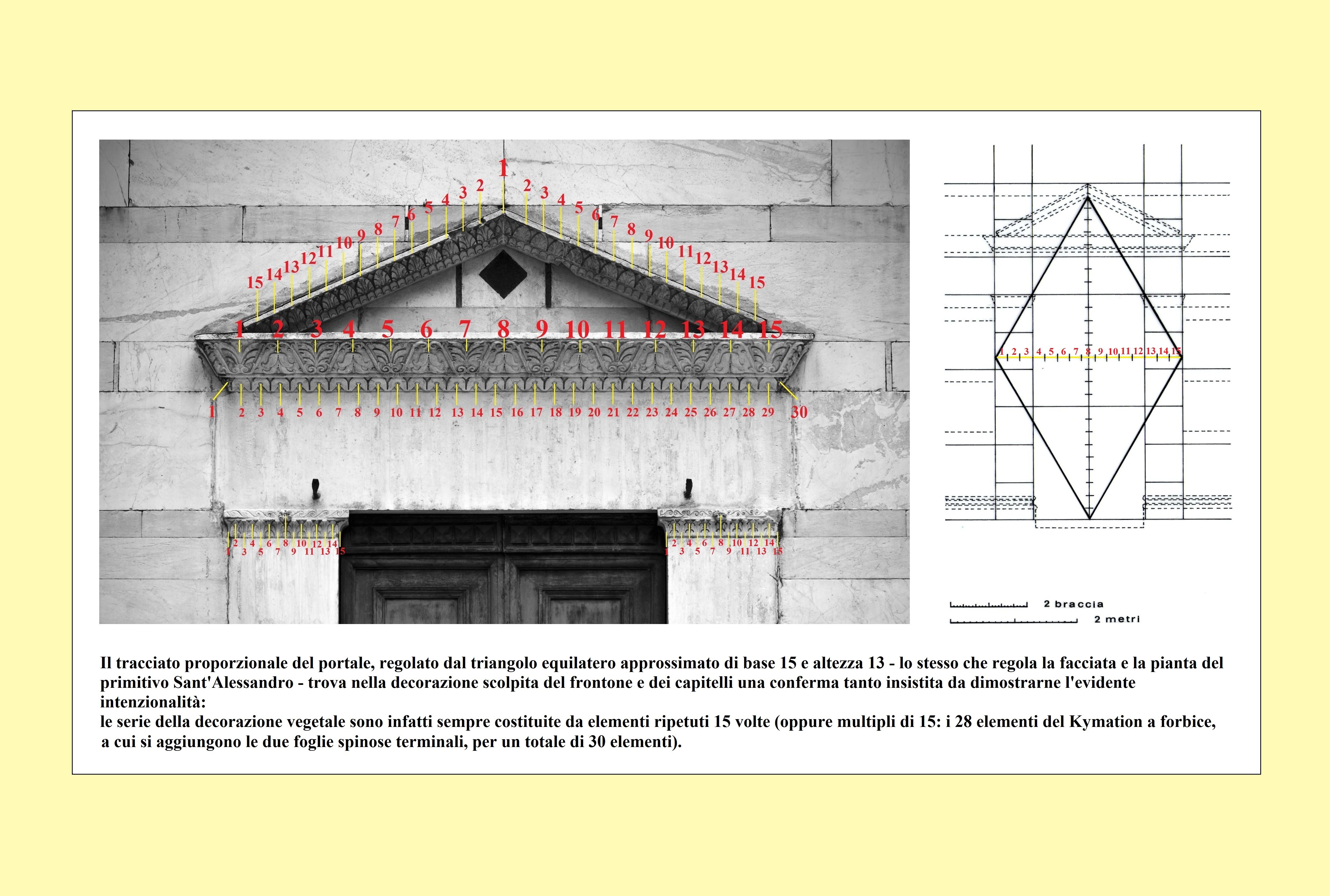 Sant'Alessandro, Lucca. Proporzioni e decorazione del portale